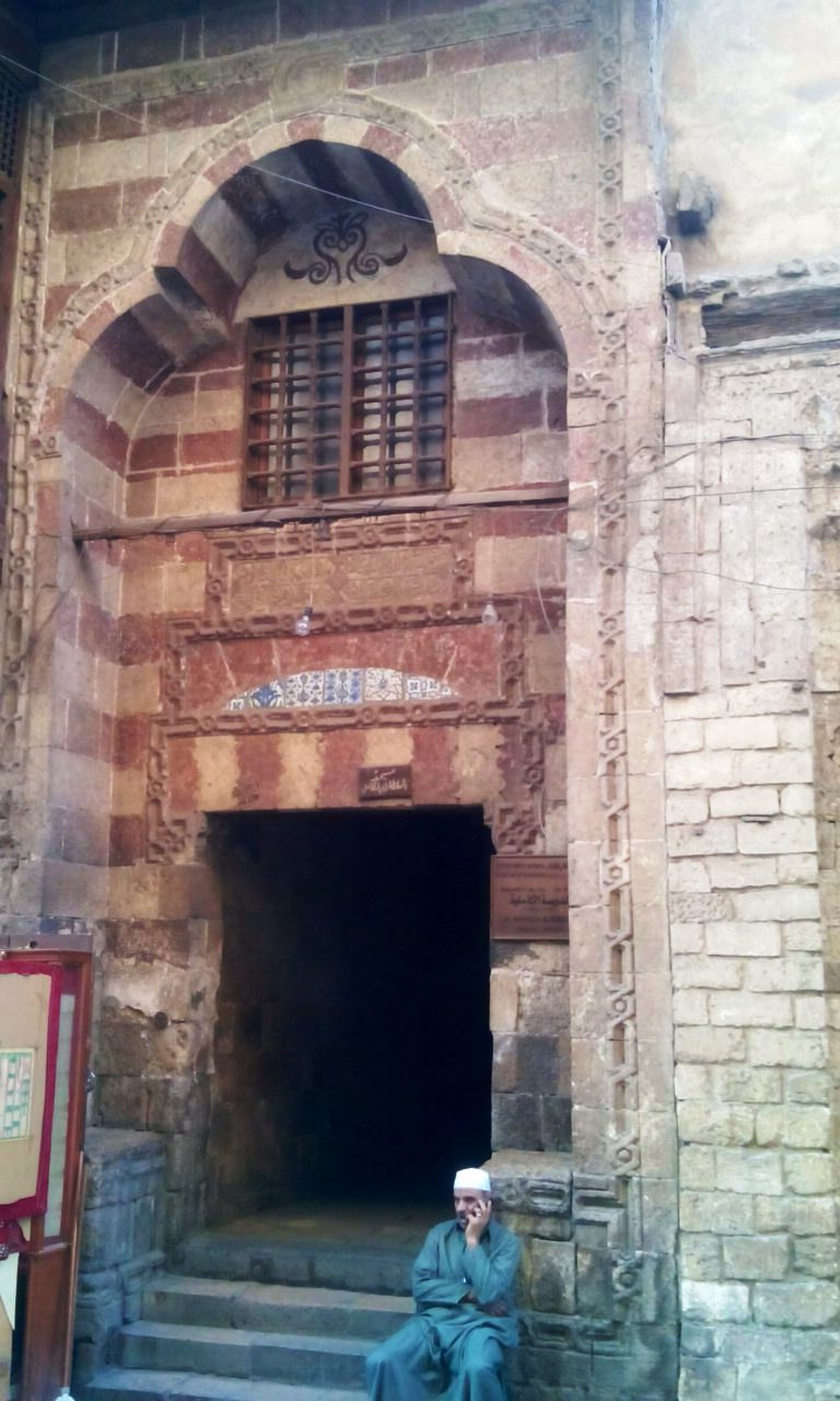 المدرسة الكاملية بشارع المعز لدين الله الفاطمي بالقاهرة.